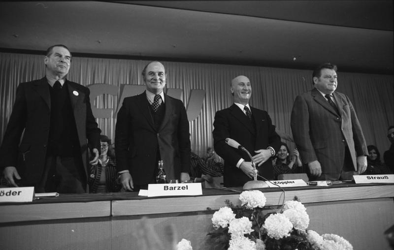 Großkundgebung der CDU zur Bundestagswahl in Köln, Messehalle